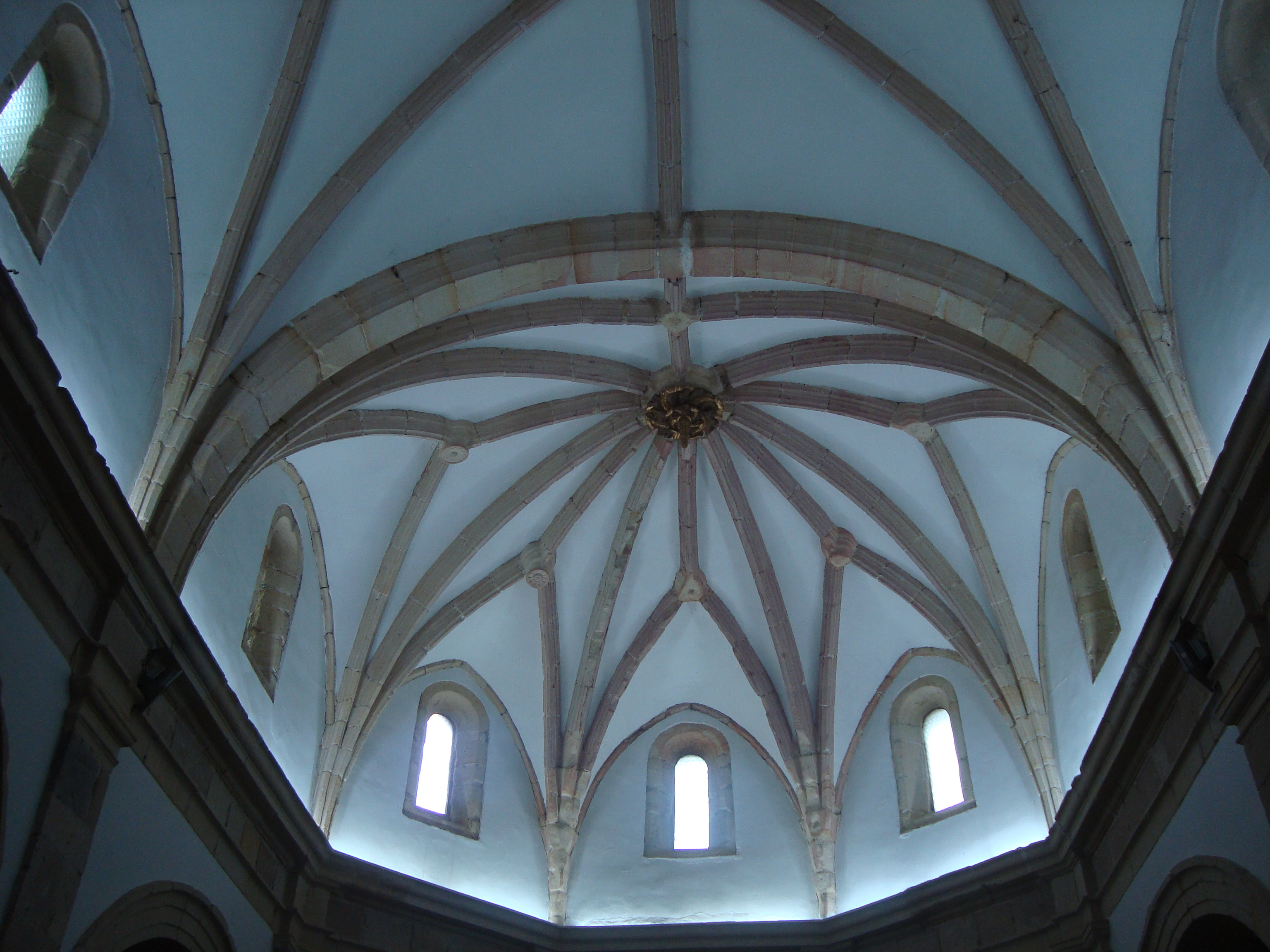 Església parroquial de l'Assumpció (Bell-lloc) 05.029-002.